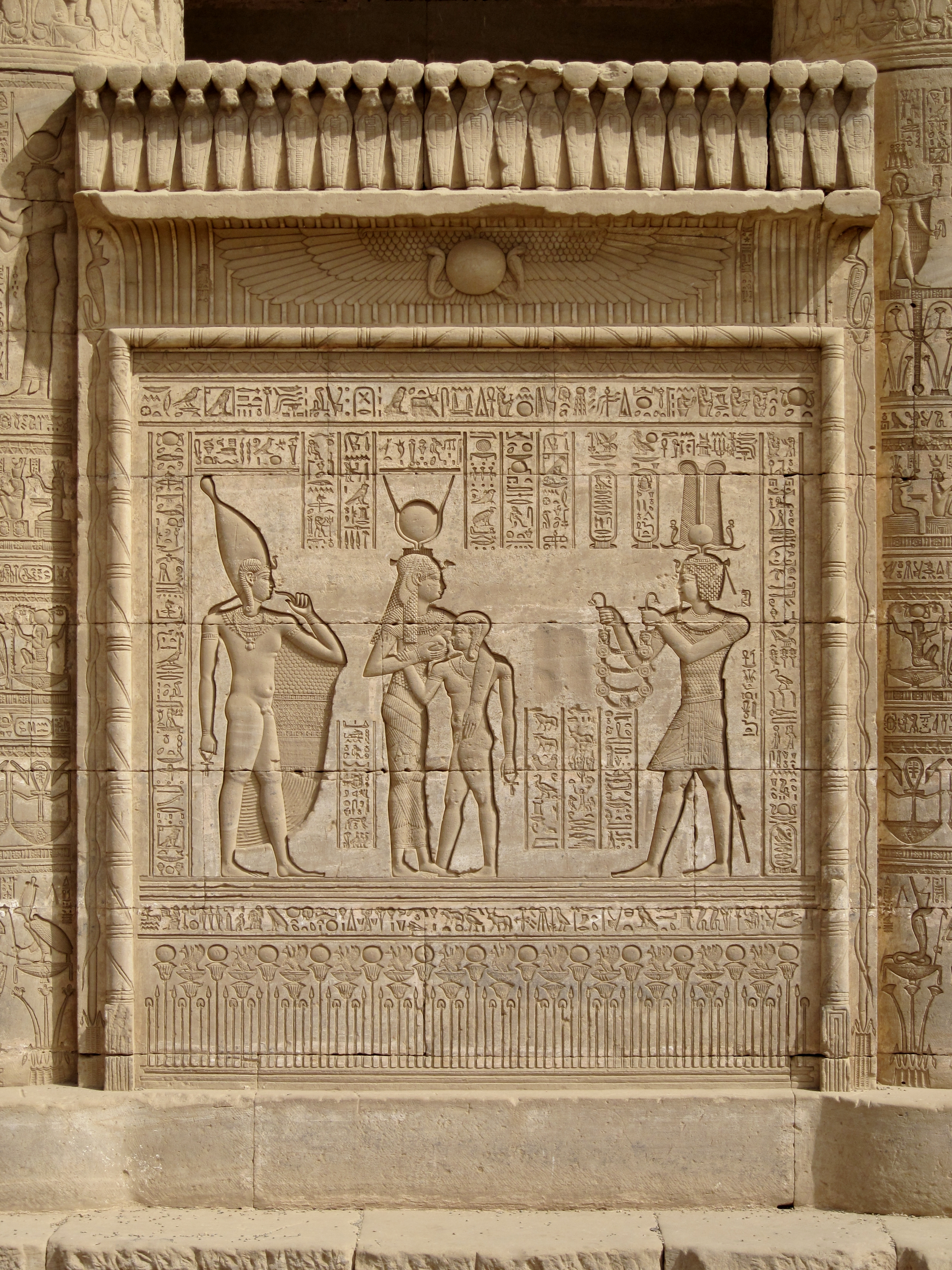 Römisches Mammisi im Tempelkomplex von Dendera, Ägypten